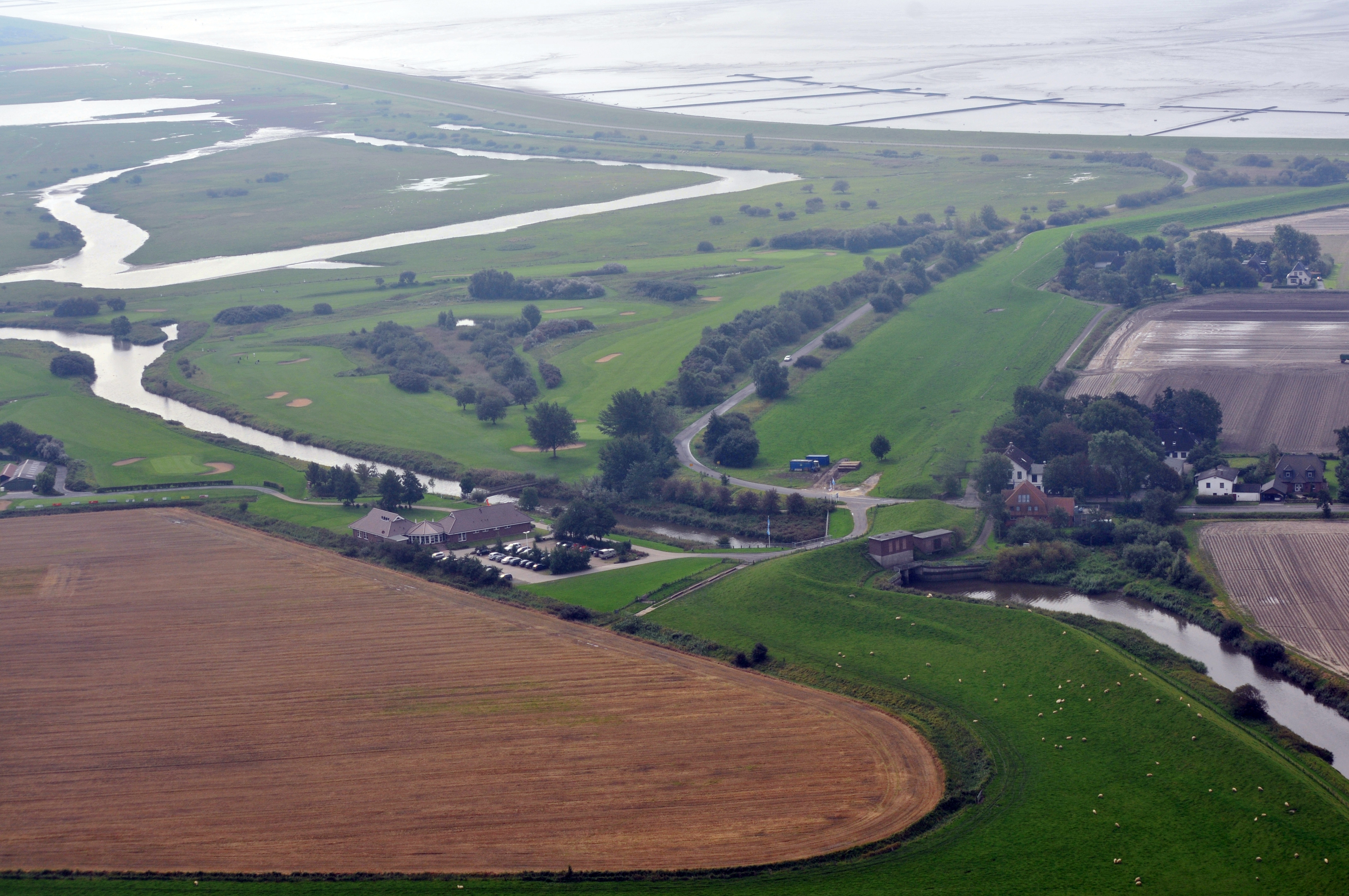 Fotoflug 4. Sept. 2011; Golfplatz und NSG Wöhrdener Loch, Warwerort, Kreis Dithmarschen, Schleswig-Holstein, Deutschland; Feld und Golfplatzgebäude im Vordergrund (vor dem Kanal) gehören zum Gemeindegebiet von Friedrichsgabekoog